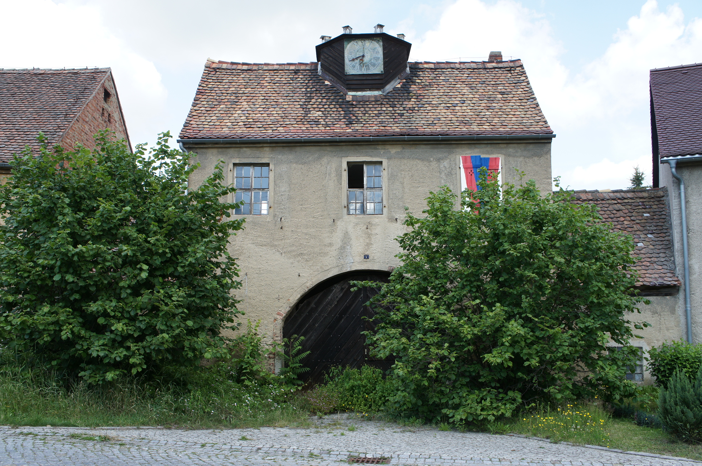 Rittergut in Sollschwitz bei Göda. Erbaut im 18. Jh., heute leerstehend und dem Verfall preißgegeben. Torhaus, mit Dachreiter; jetzt ohne Glocke und Haube; die Wetterfahne war mit 1833 bezeichnet